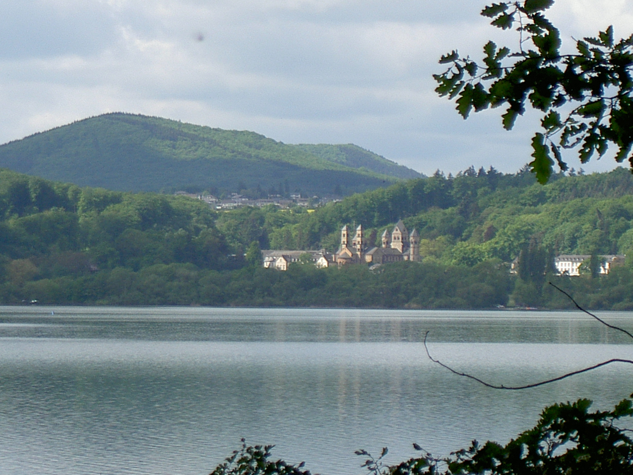 Laacher See, mit Benediktinerabtei Maria Laach im Hintergrund